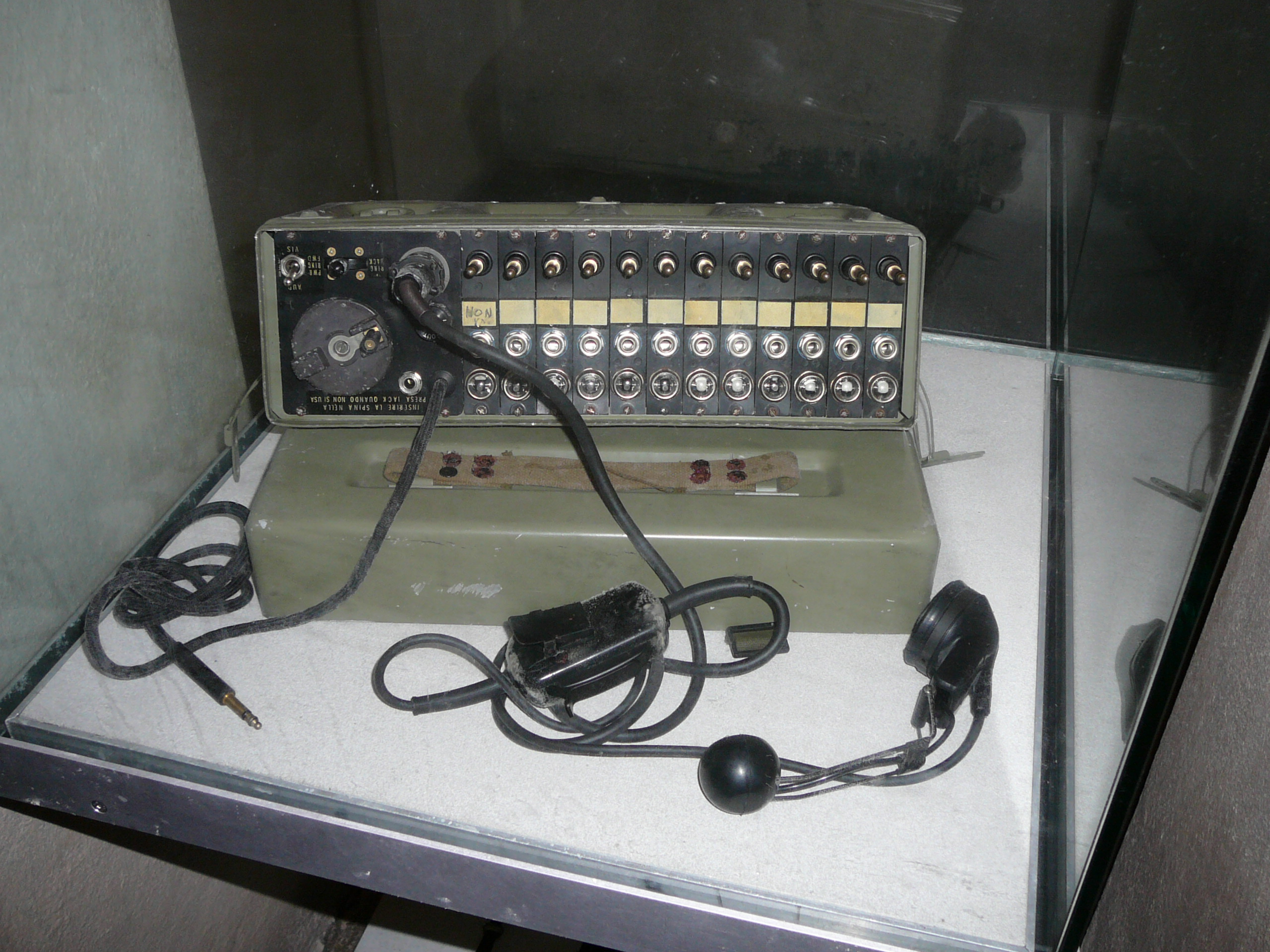 Centralino SB22, utilizzato dentro le opere del Vallo Alpino